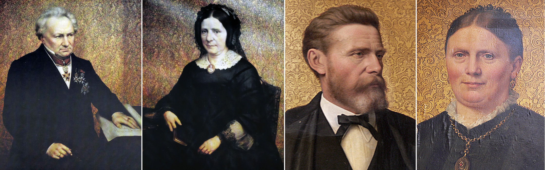 Collage van vier portretschilderingen van leden van de familie Regout door de Roermondse kunstschilder Peter Heinrich Windhausen (1832-1903). Collage door Kleon3 samengesteld met gebruikmaking van vier bestanden onder vrije licenties op Wikimedia Commons: File:Petrus Laurentius Regout (1801-1878).jpg File:Maria Aldegonda Hoeberechts (1798-1878).jpg File:Eugène Bernard Hubert Regout (1831-1908).jpg File:Léonie Marie Hubertine Regout (1837-1906).jpg